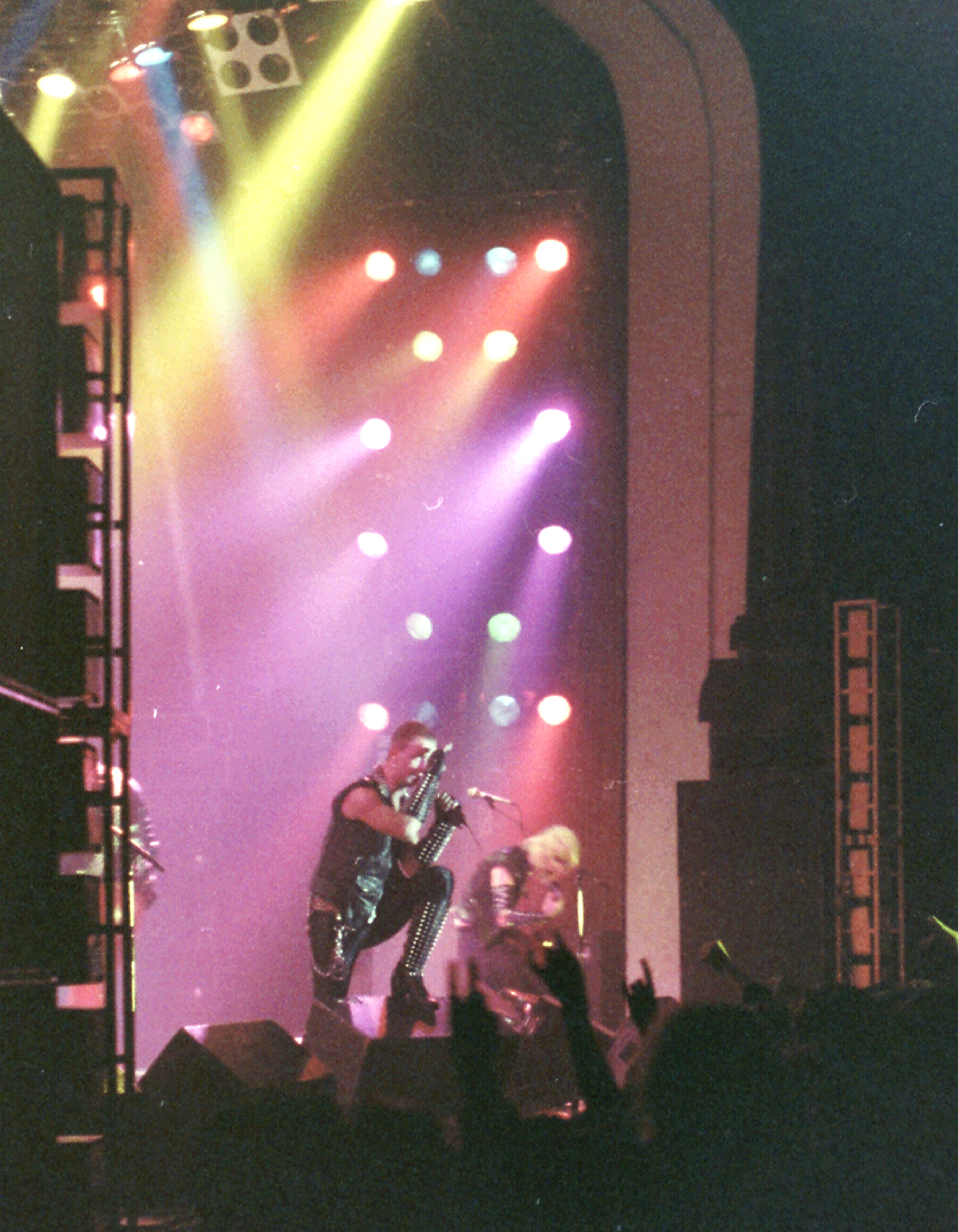 Emiliàn e rumagnòl: I Judas Priest dal viṿ a Cardiff in dal 1981